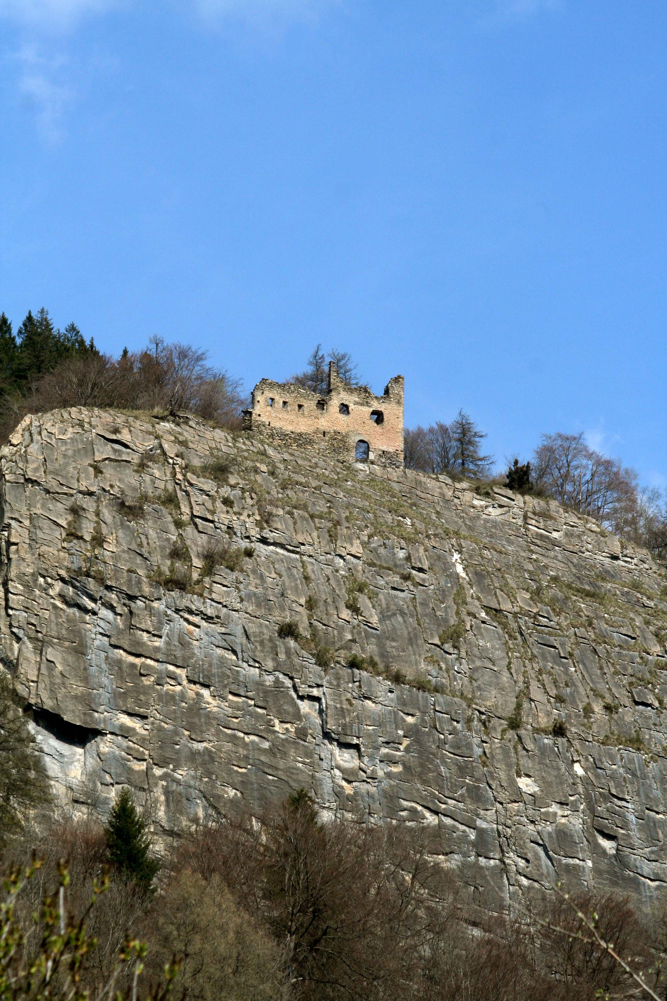 Lichtenstein Lage